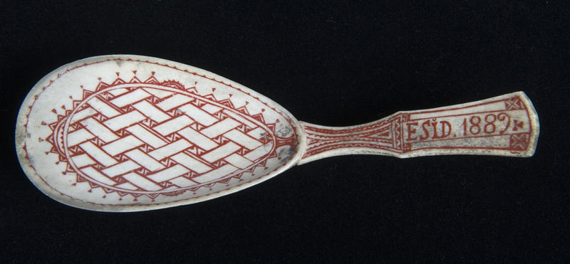 Samisk skje fra 1889 med kolrosing. Innkommet fra Namskogan i Nord-Trøndelag. Lengde 15 cm. Norsk Folkemuseum, NFSA.0294J.